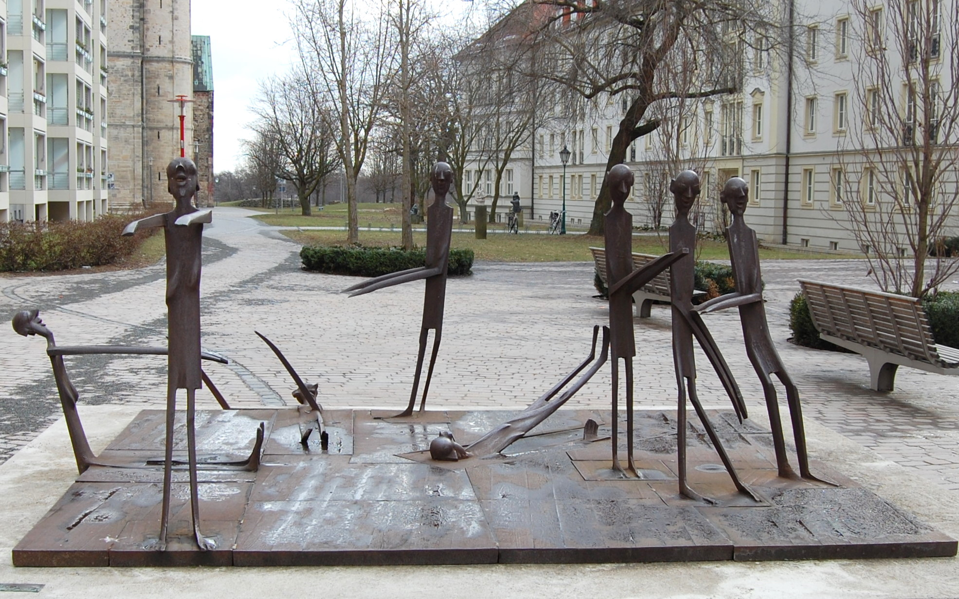 Plastik "Vertschaupet II" des Künstlers Schang Hutter in Magdeburg